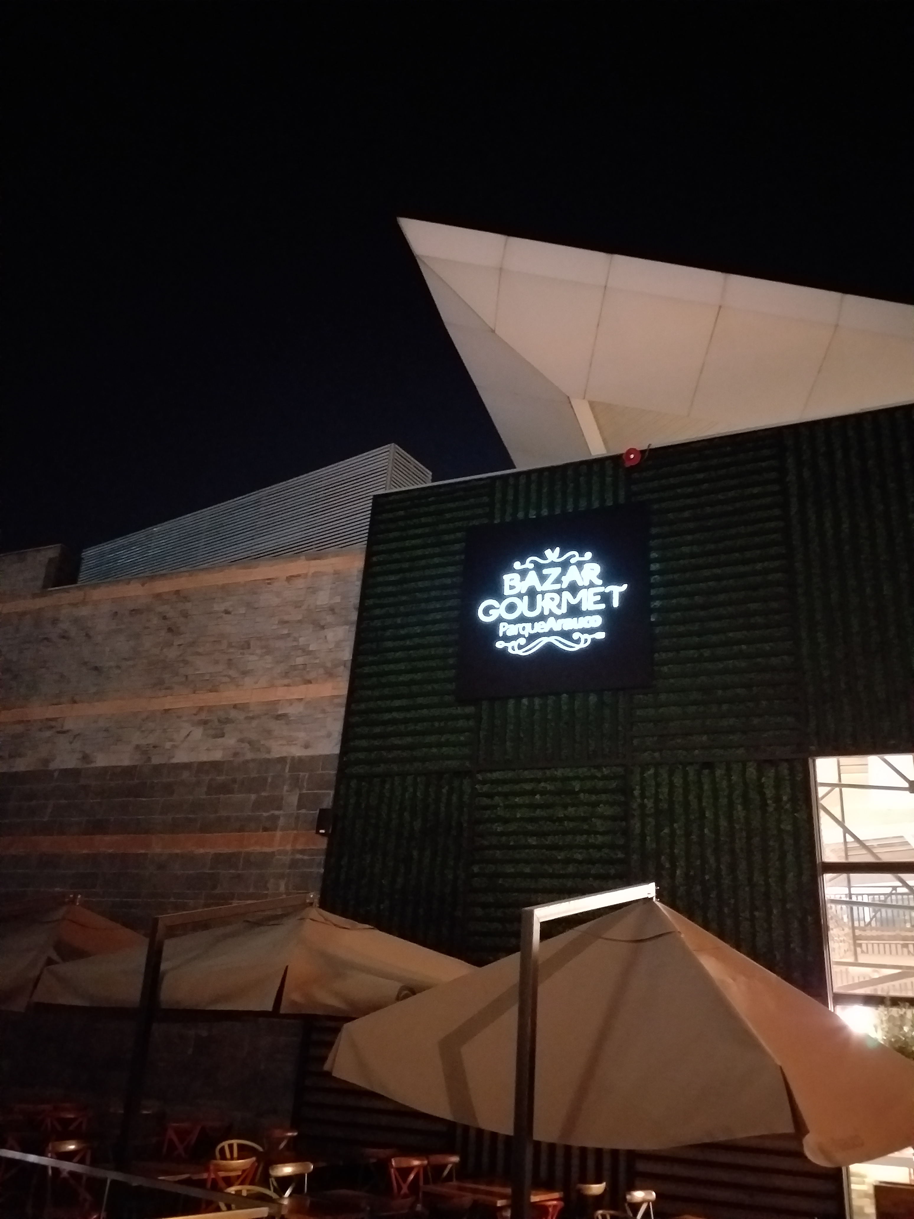 Bazar Gourmet en Distrito de lujo